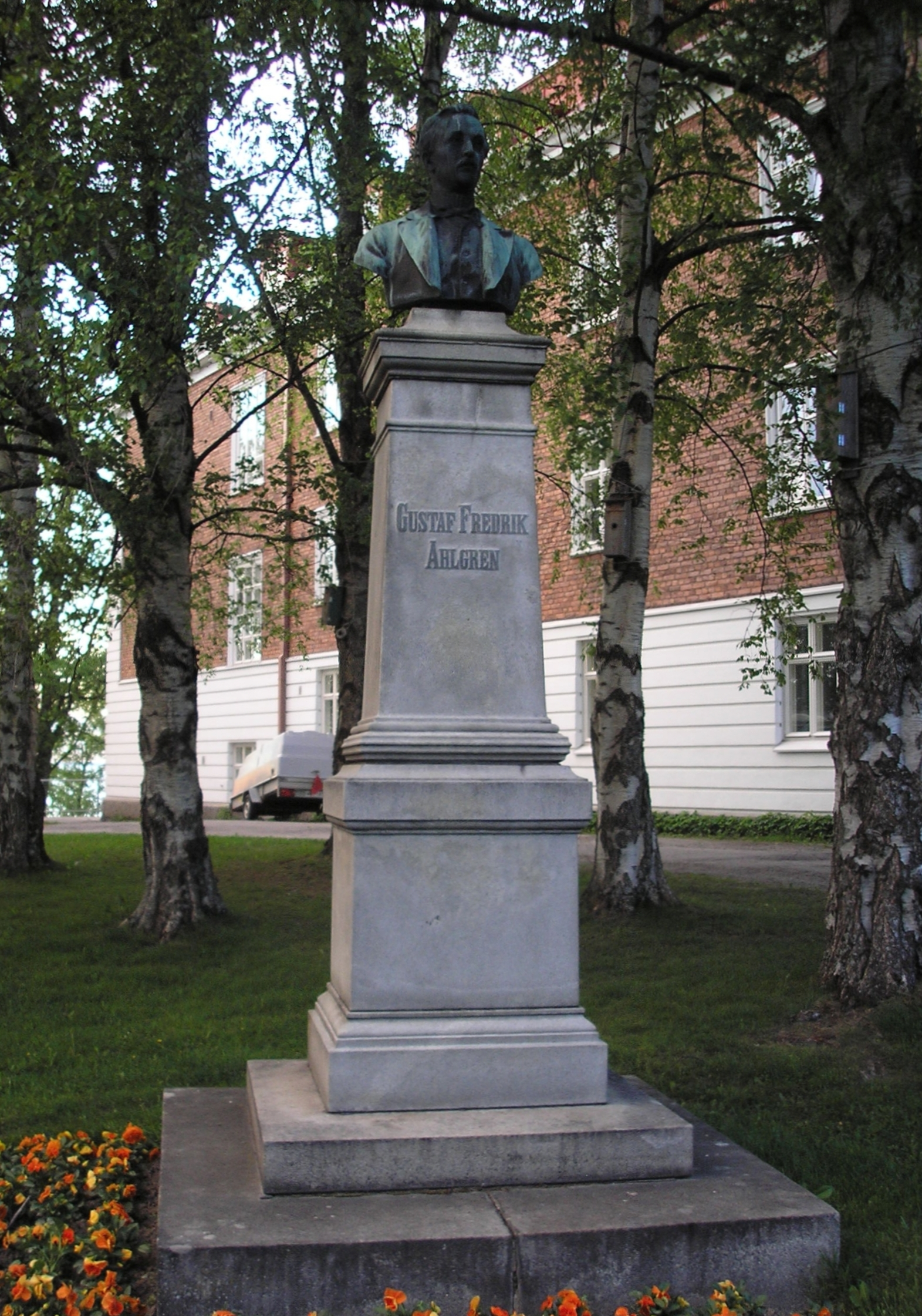 Gustaf Fredrik Ahlgrenin rintakuva (1888) - Emil Wikström. Sijainti: Koukkuniemen vanhainkoti, Rauhaniementie 19